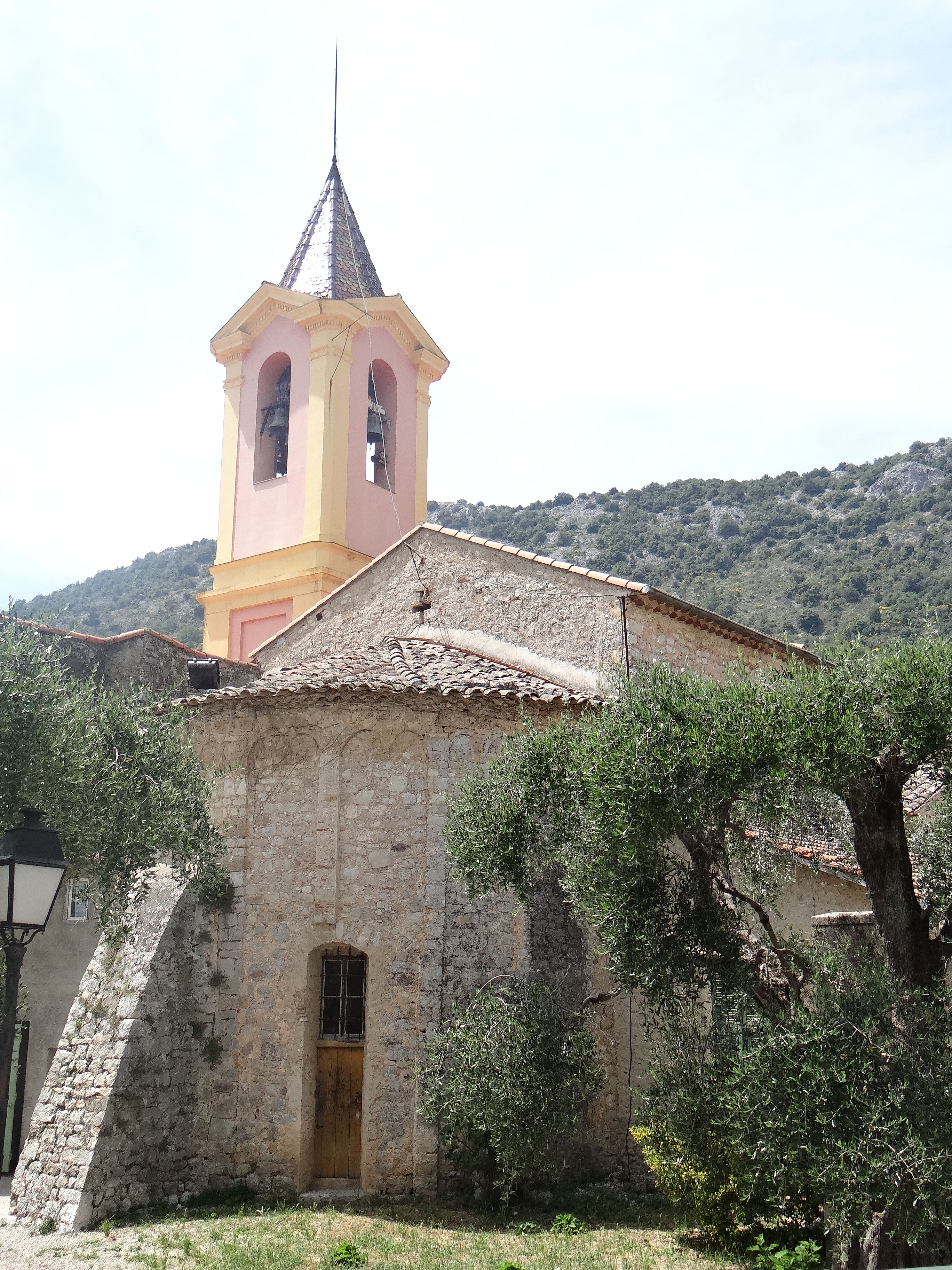 Châteauneuf-Villevieille - Église Notre-Dame-de-l'Assomption de Villevieille - Chevet